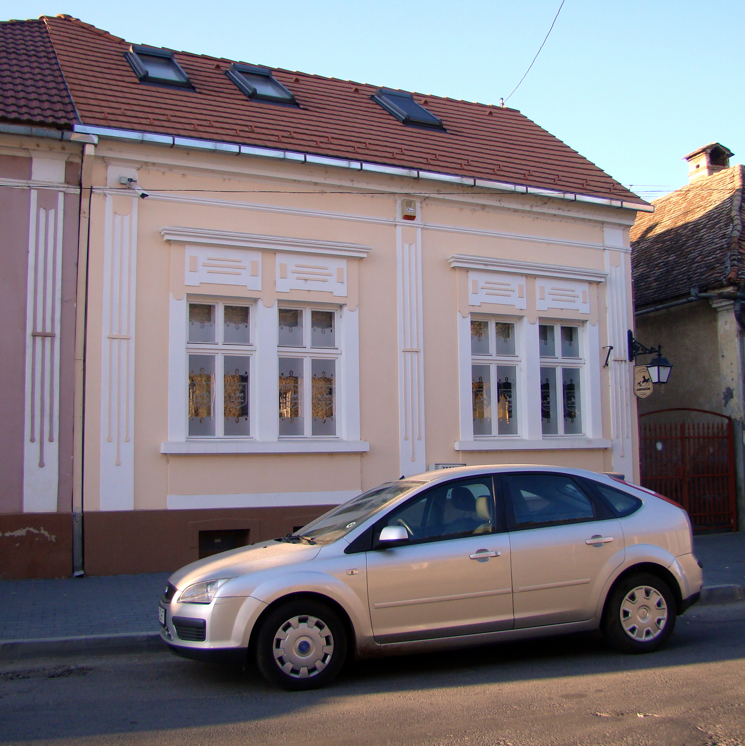 Casă, municipiul Făgăraș, str. Bălcescu Nicolae 49 sec. XVIII